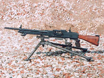 [口径]7.62mm [全長]約1,200mm [銃身長]600mm（消炎器とも） [重量]約10.7kg（二脚架付） [給弾方式]ベルト給弾 [製作]住友重機械工業 29年から開発し、37年2月仮制式となった。空冷ガス利用ピストン後退式の自動火器で、日本人の体格にマッチさせたため、従来のA1、A6より軽量である。照準眼鏡（倍率3倍・富士写真光機製）を装着し銃身は熱効果を考慮して羽根状にできている。軽快な運用を手とする場合には、二脚架を付け、良好な命中精度を期待する場合は三脚架を装着する。